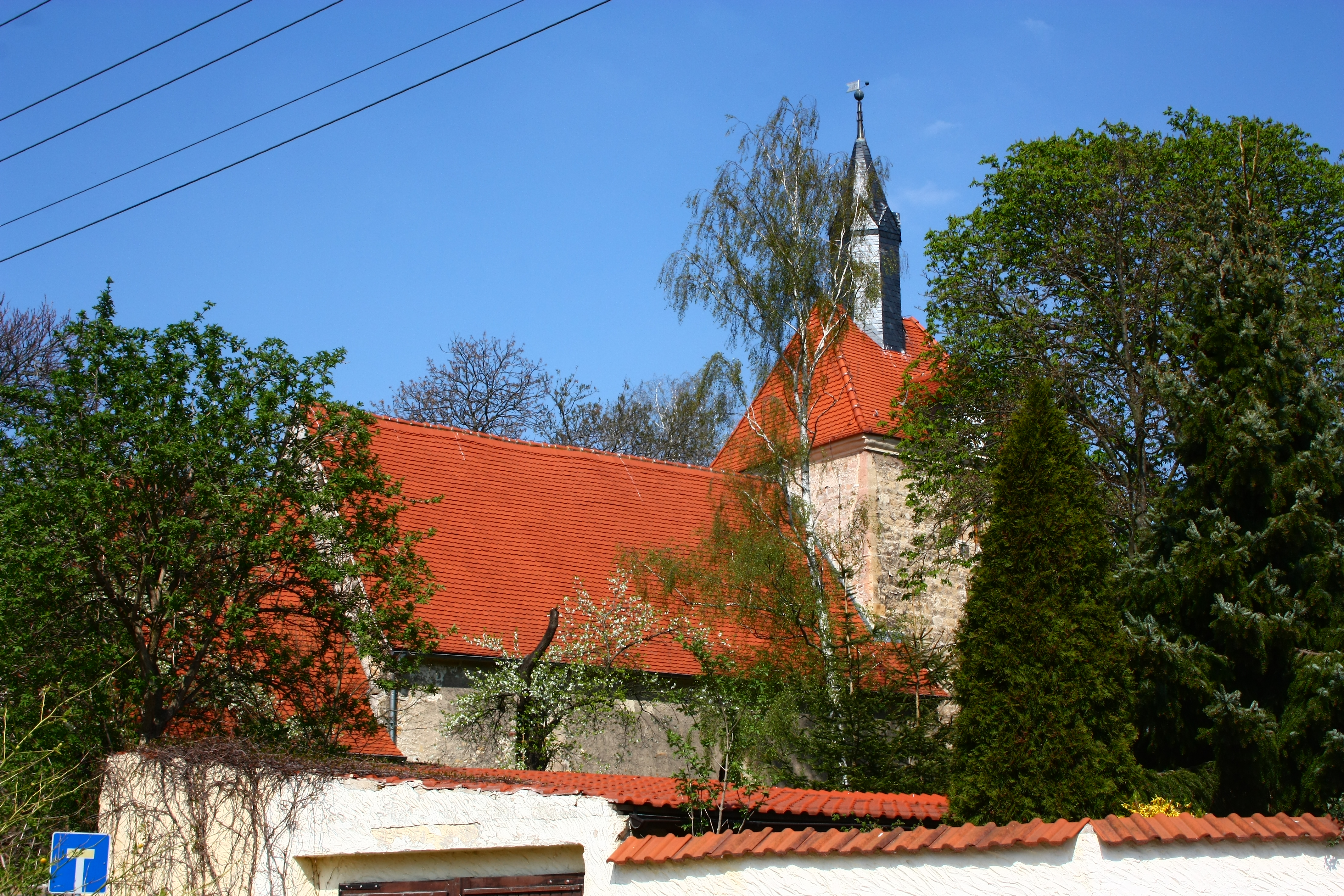 die Dorfkirche von Bennstedt